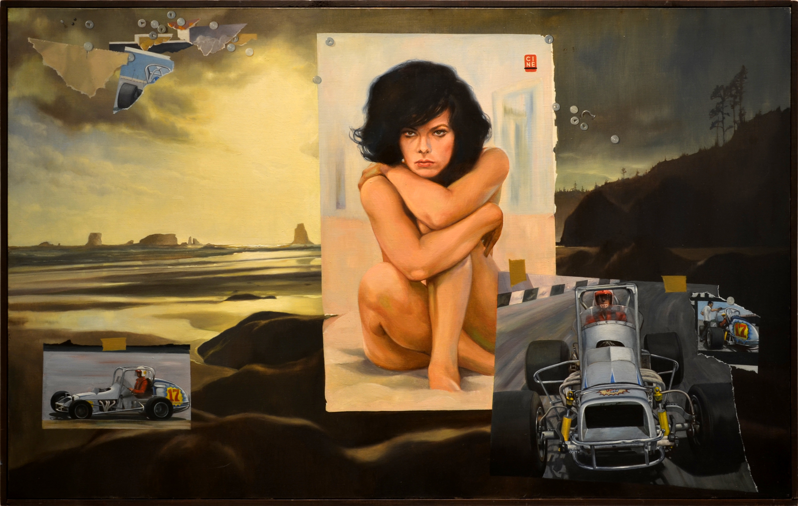 Theodor Pištěk, Midget, olej na plátně, 1977